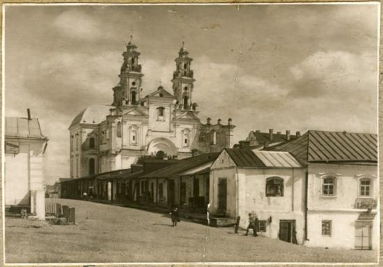 Widok kościoła od fasady lata 1647 - 1651 Pińsk, kościół i kolegium jezuitów